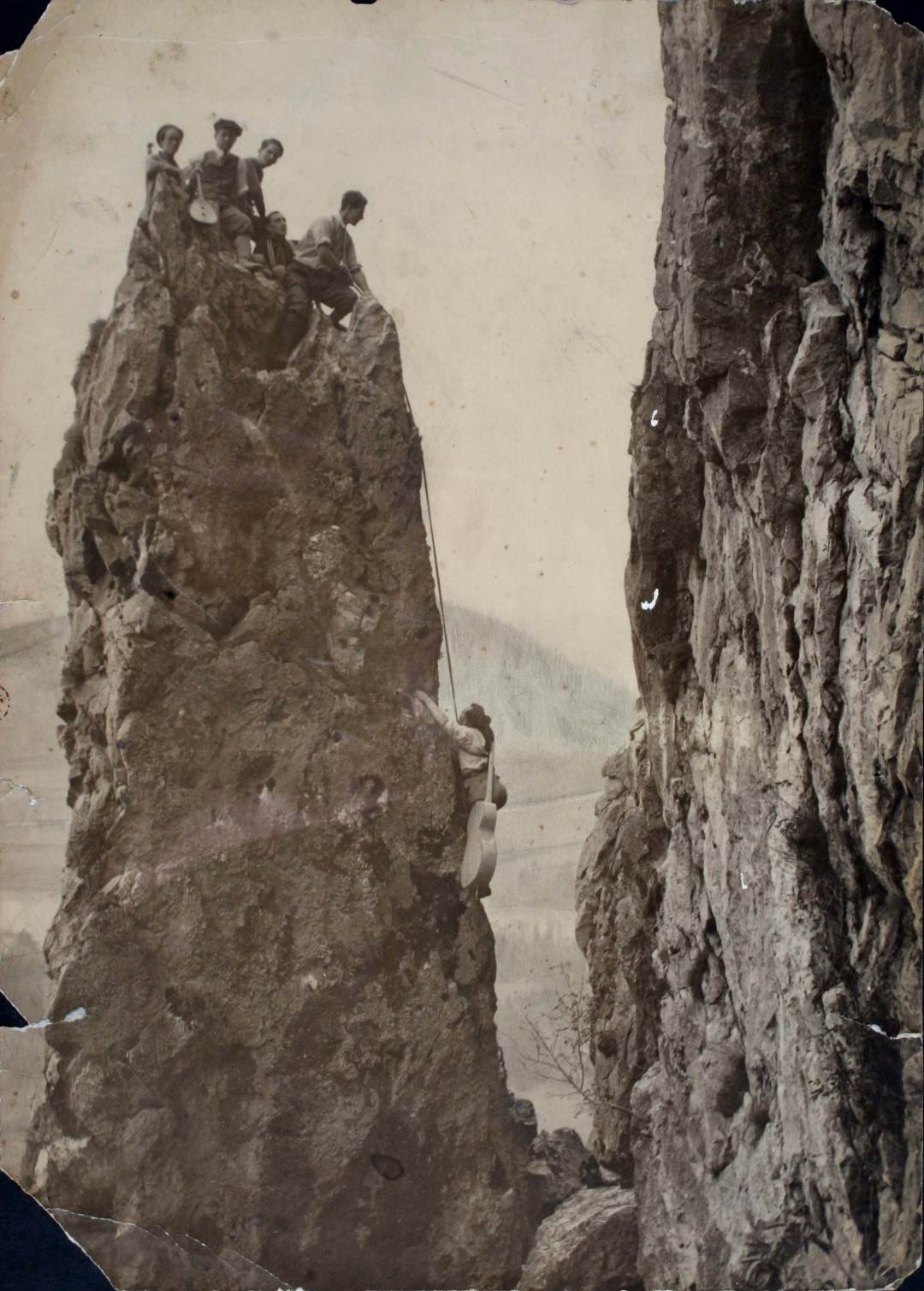 Skalaši plezajo na Turncu pod Grmado.